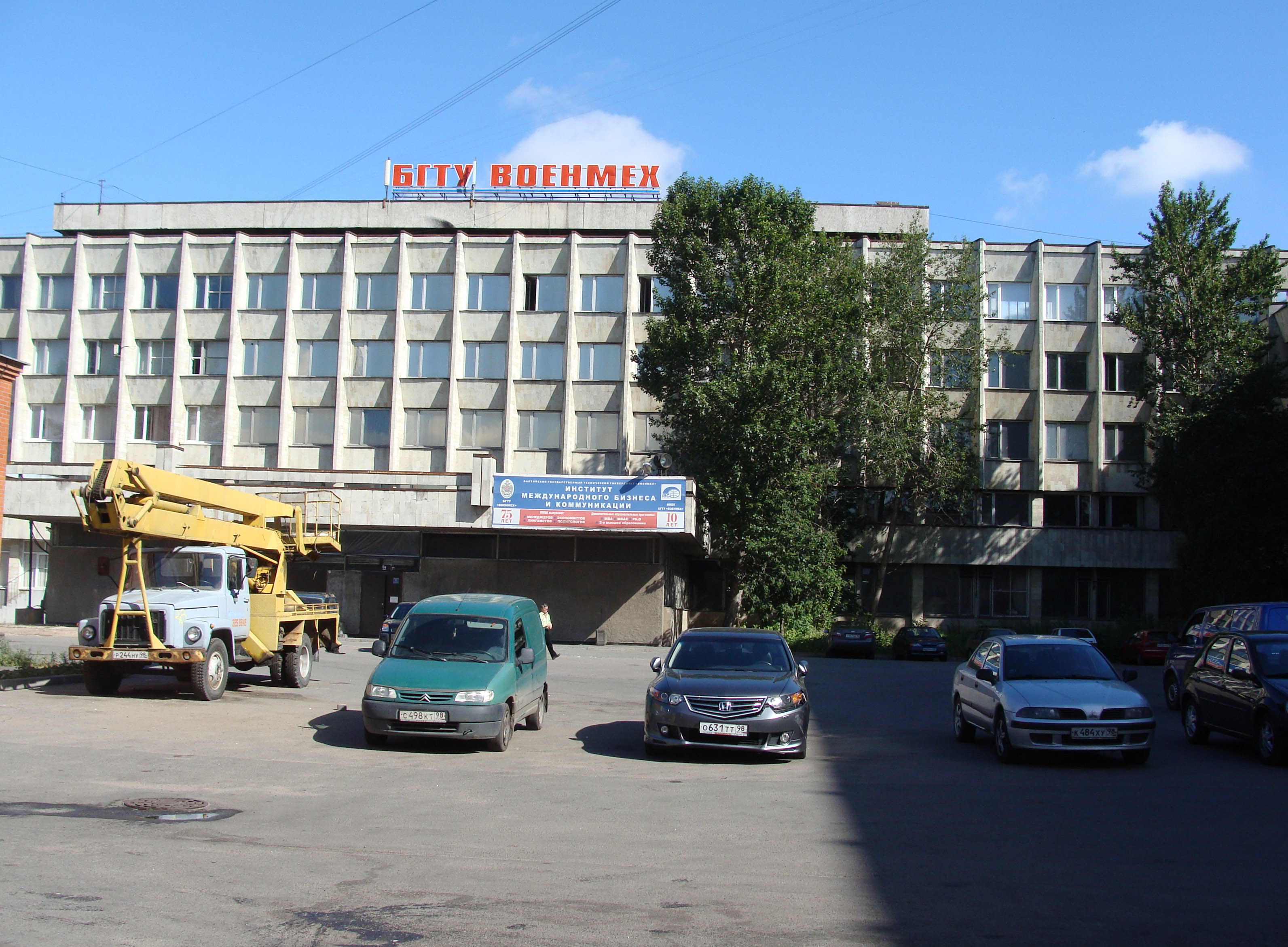 БГТУ Военмех Учебный корпус